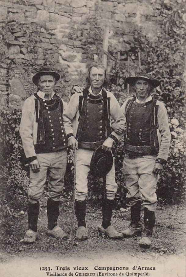 Trois vieillards de Guiscriff en costume traditionnel au début du XXe siècle